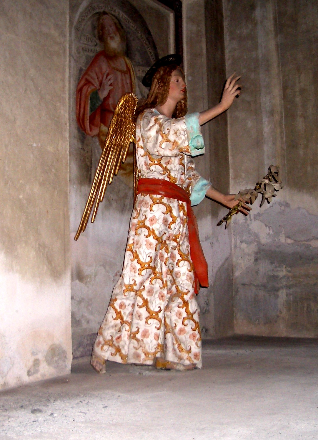 Italy, Sacro Monte di Varallo (VC), Chapel II